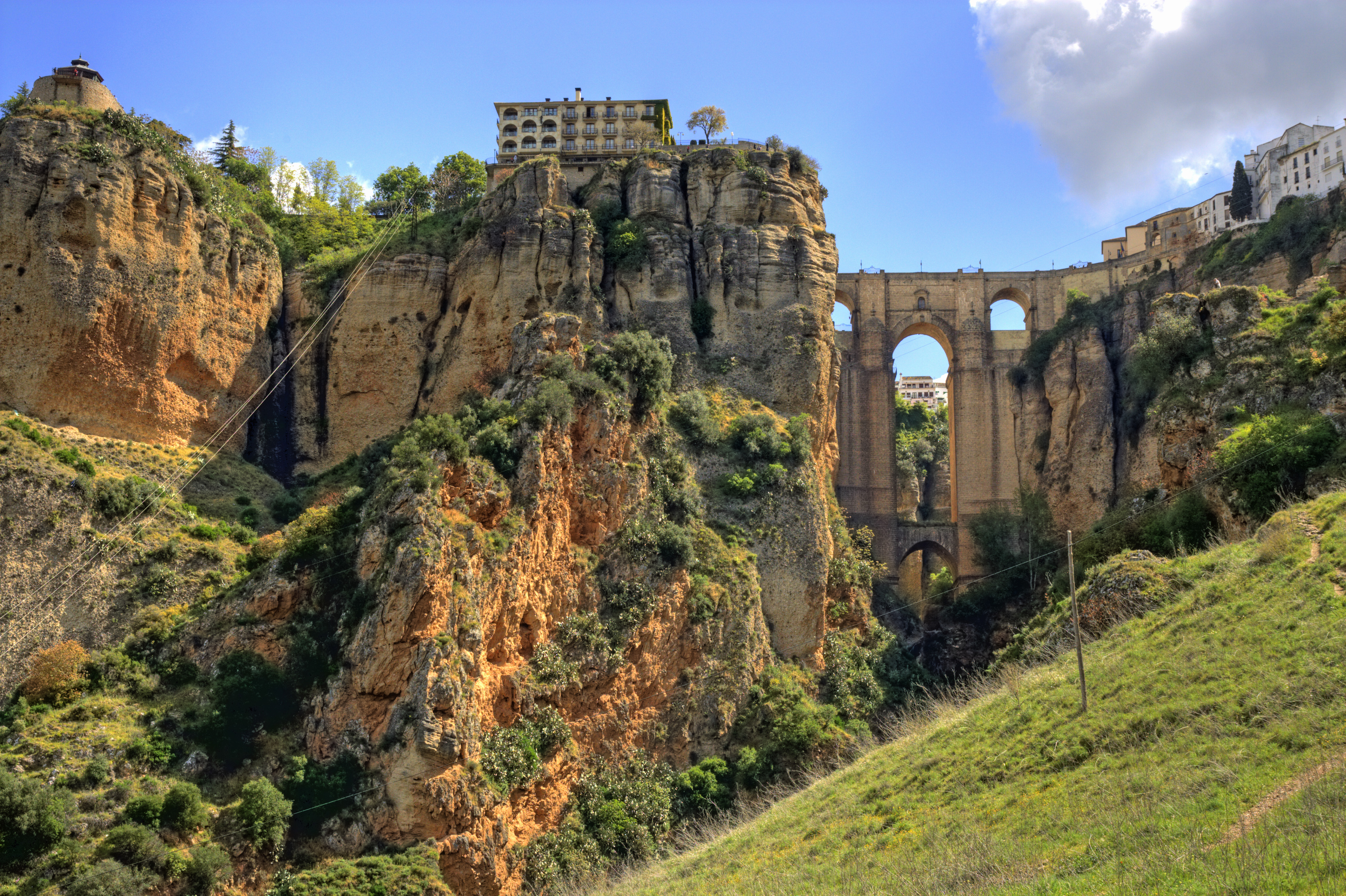 Vista del Puente Nuevo, en Ronda (provincia de Málaga, España).